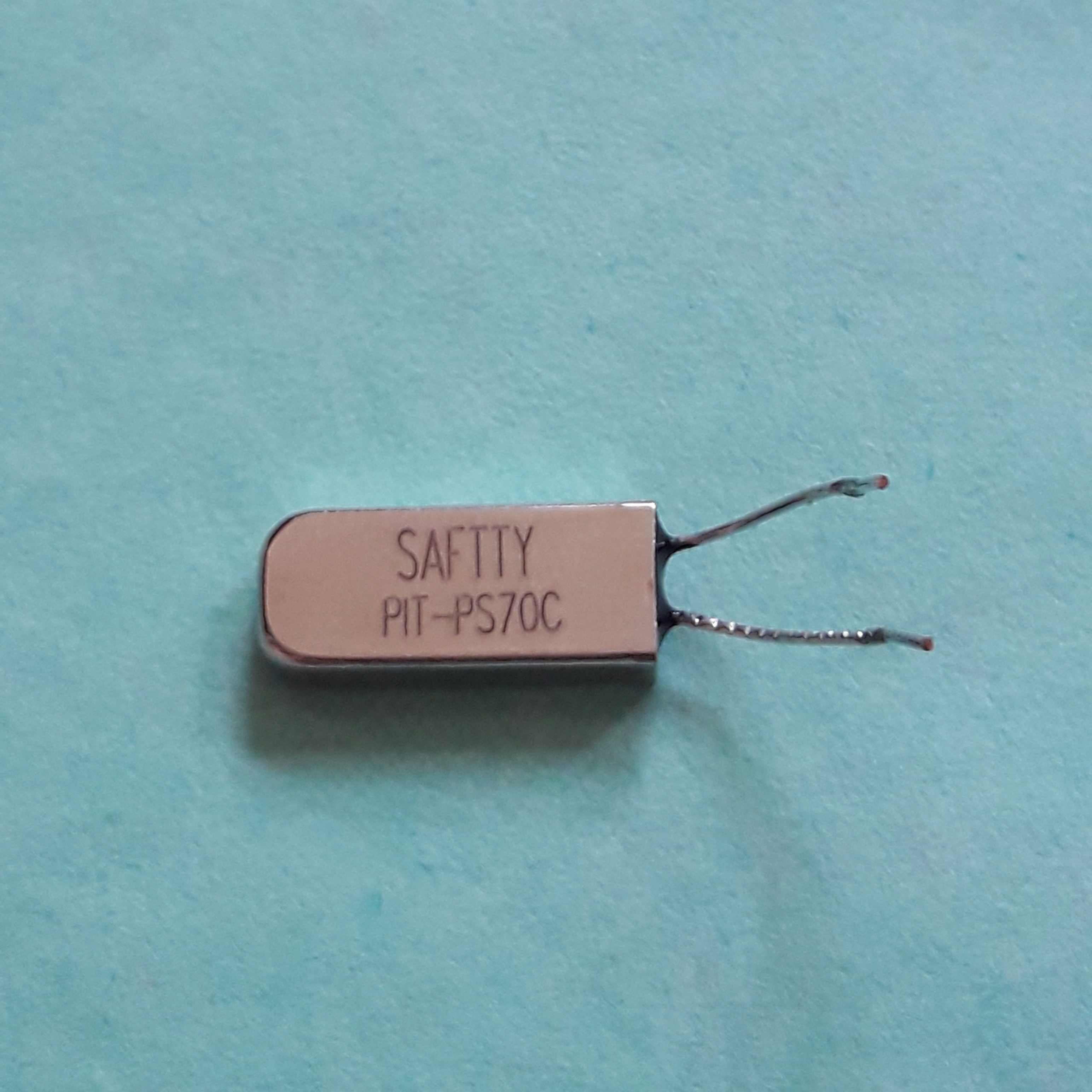 Тепловое реле теплового пожарного извещателя ИП 103-5/4 A2